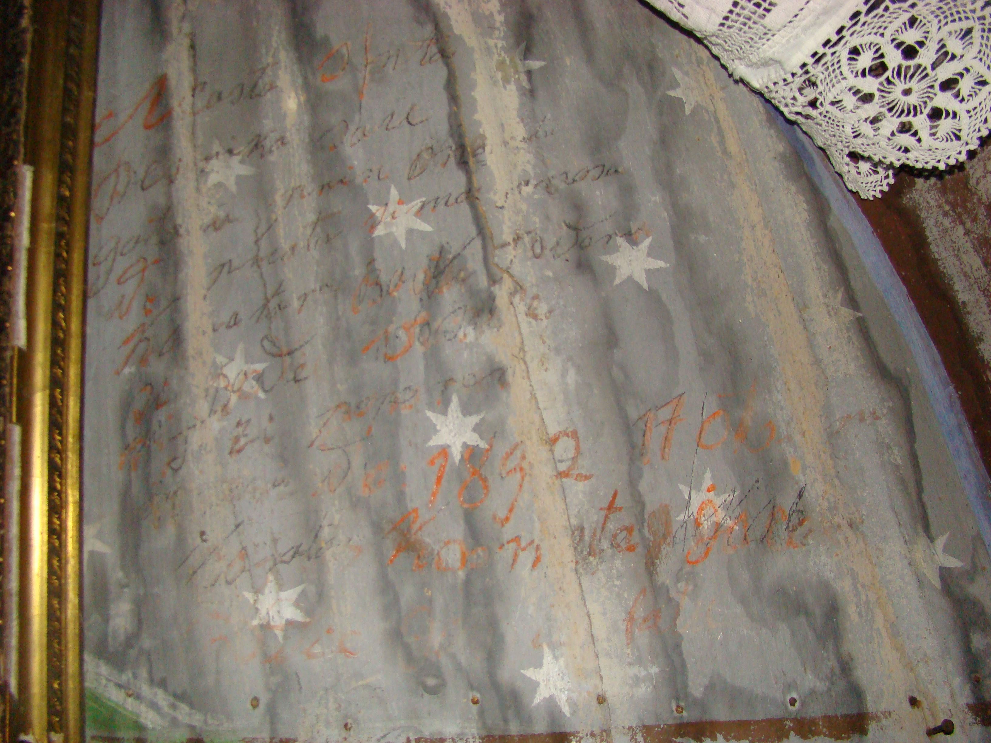 Biserica de lemn "Sfinții Împăraţi" din Aspra